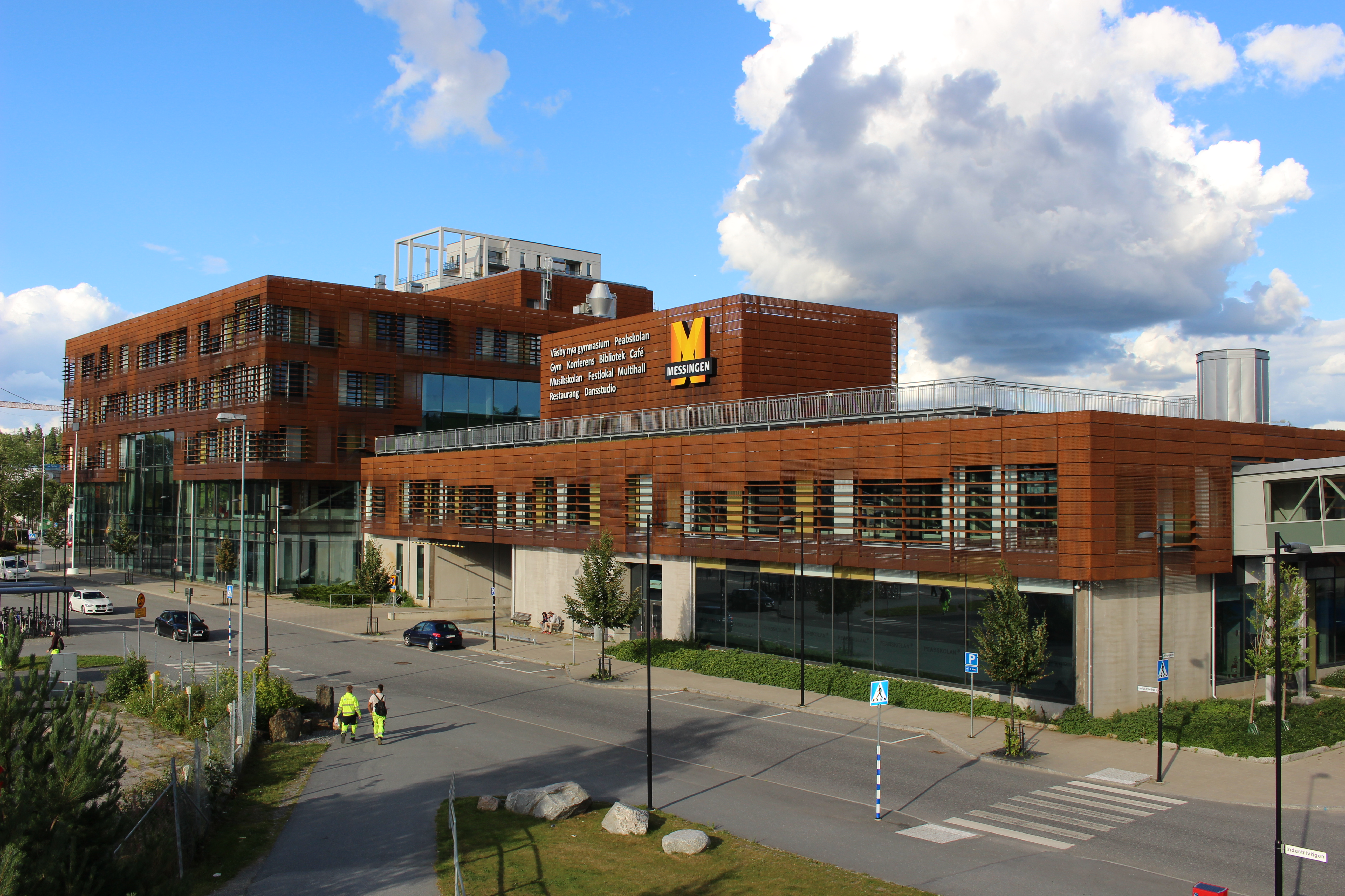 Väsby nya gymnasium